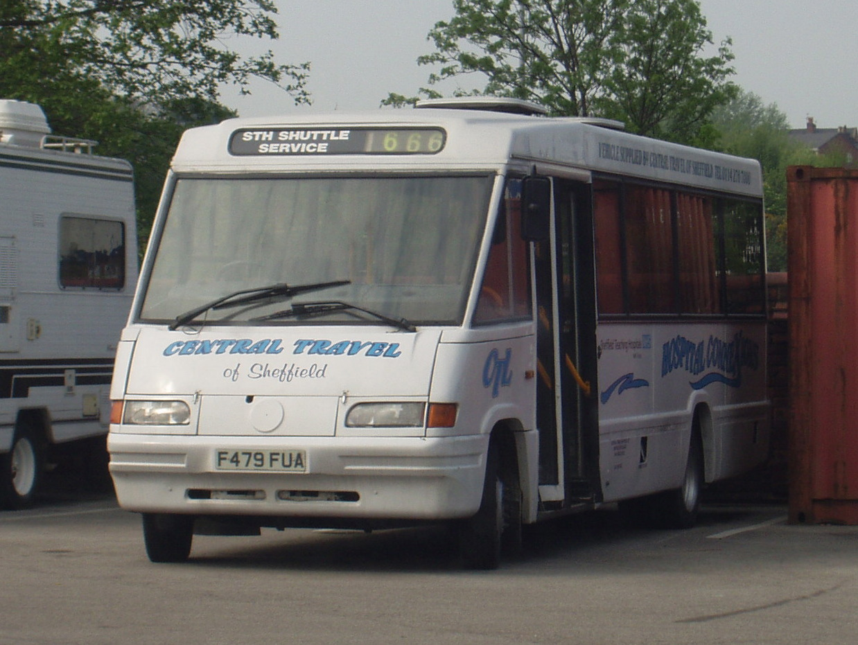 Optare StarRider midibus (Mercedes-Benz chassis).